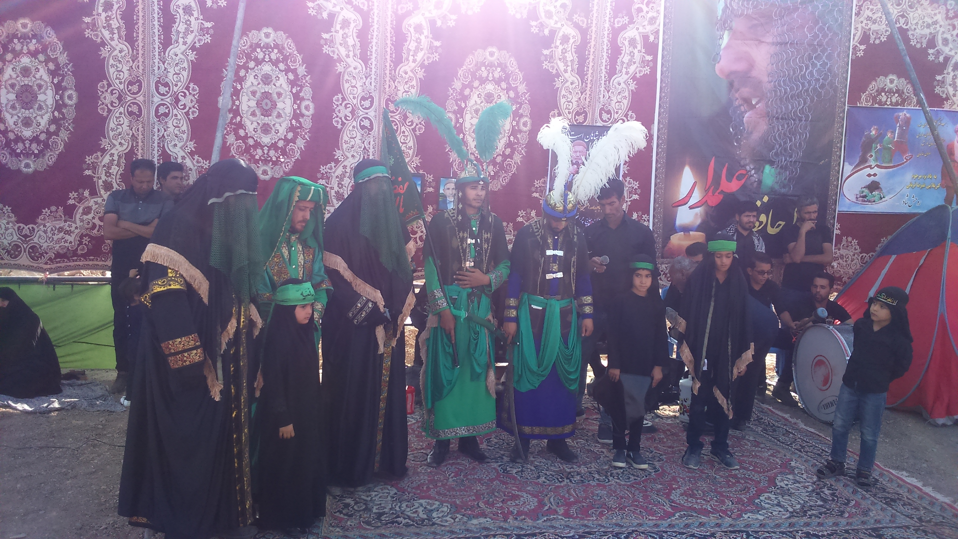 اولین اجرای تعزیه جوانان روستای کوشه بردسکن